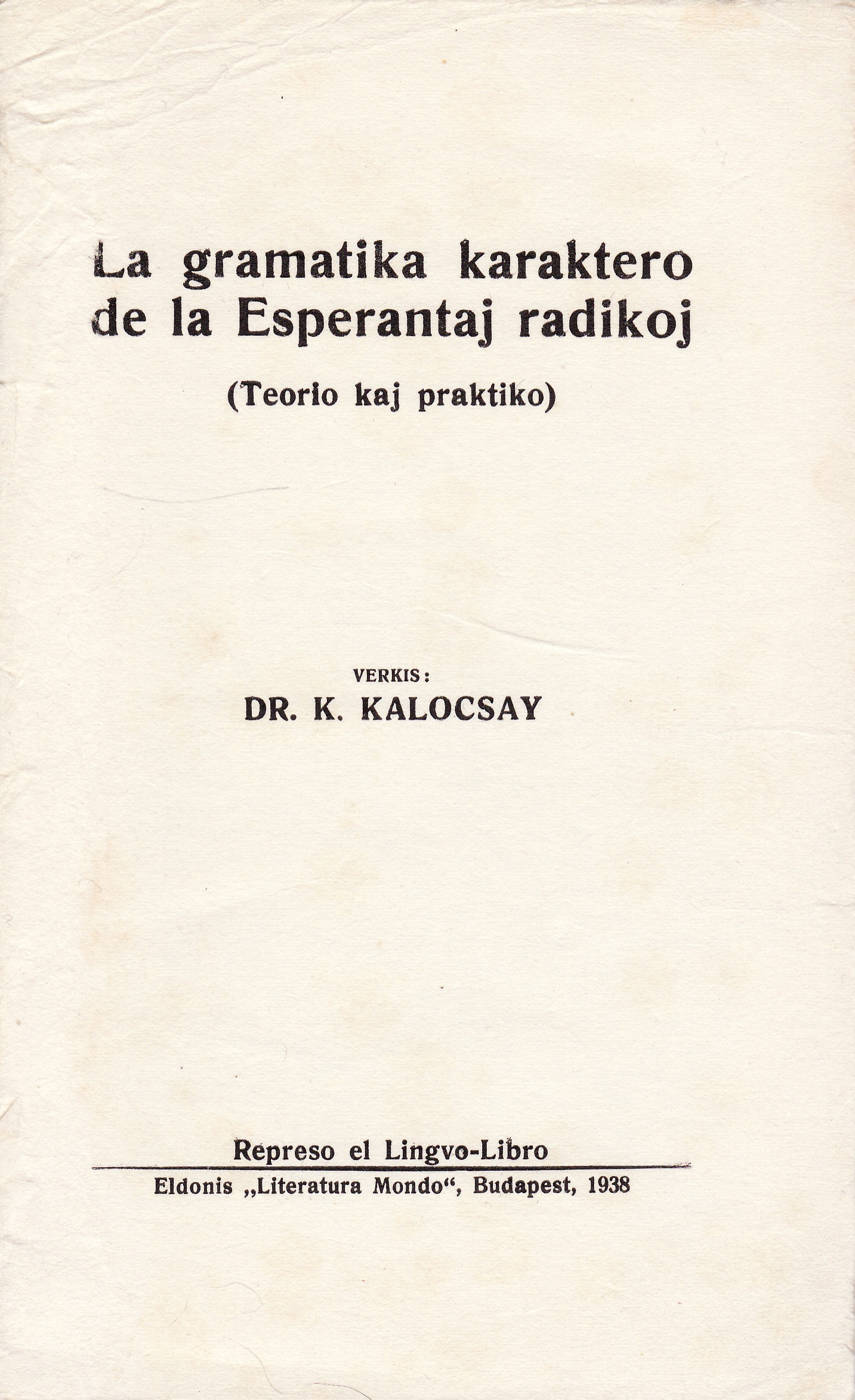 la kovrilpaĝo de "La gramatika karaktero de la Esperantaj radikoj" eldono 1938